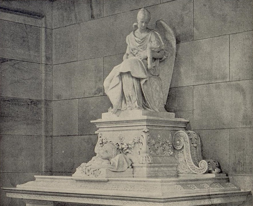 Reinhold Begas - Grabmal des Prinzen Sigismund in der Friedenskirche (Potsdam)